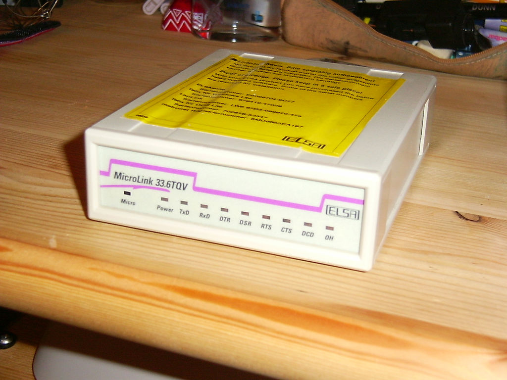 Ja, mein erstes modem, die Hülle war nicht wie bei den heutigen externen Modems aus Plastik sondenr aus massivem Stahl!